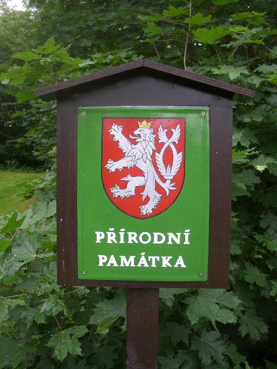 Tabule s malým státním znakem ČR, používaná k označení území přírodní pamatky (zde konkrétně PP Hostibejk).